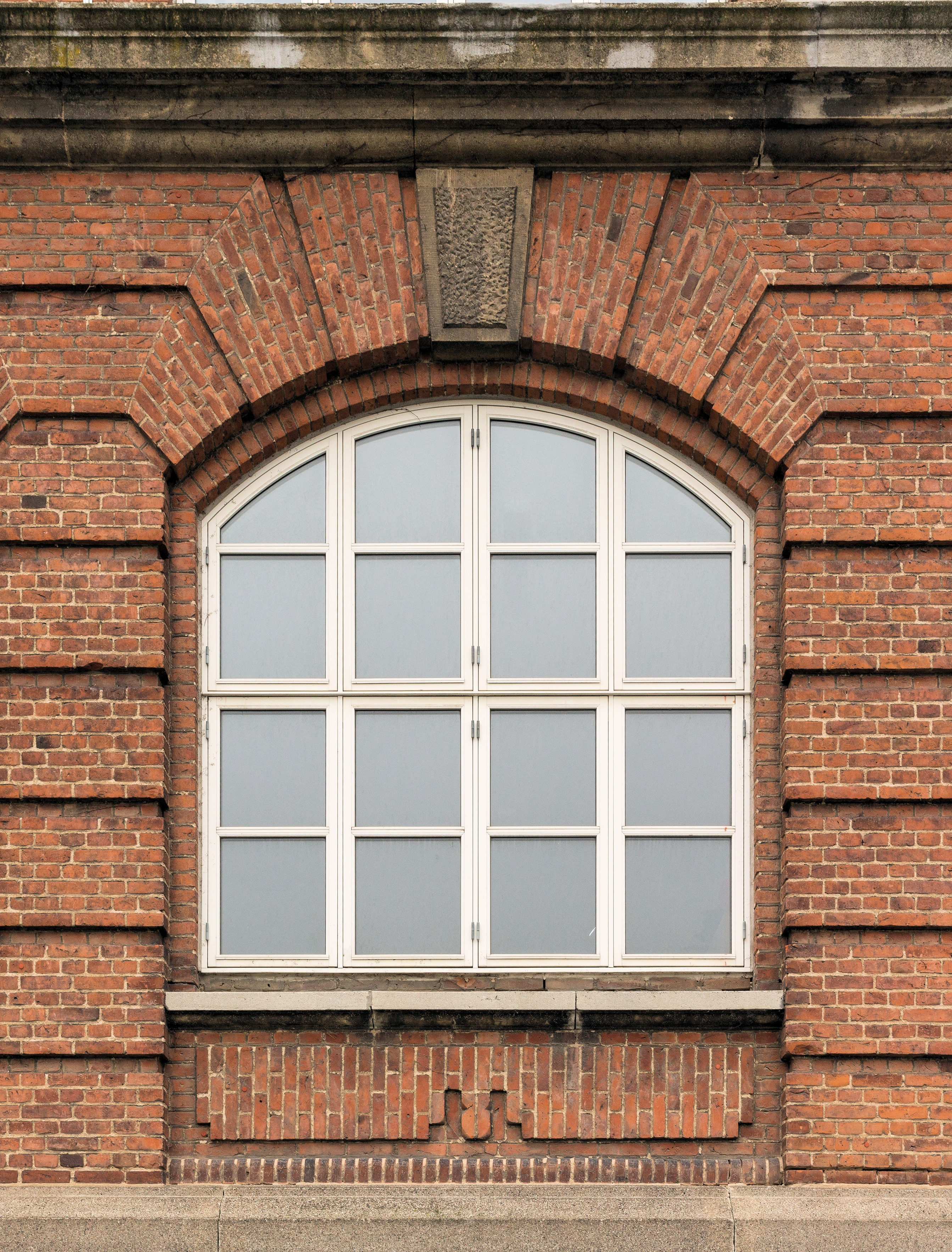 Refendfugning ved vindue på Læssøesgades Skole